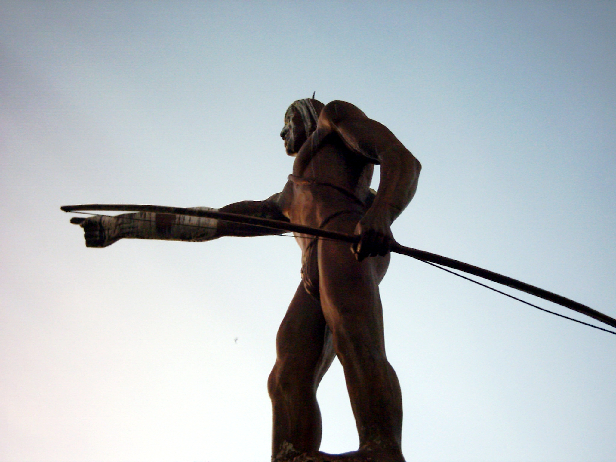 Monumento al Indigena Guaicaipuro en el punto mas alto de la ciudad de Los Teques